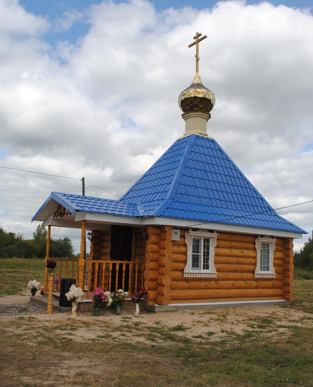 Храм-часовня с.Чермные Дата основания 10 августа 2019г.